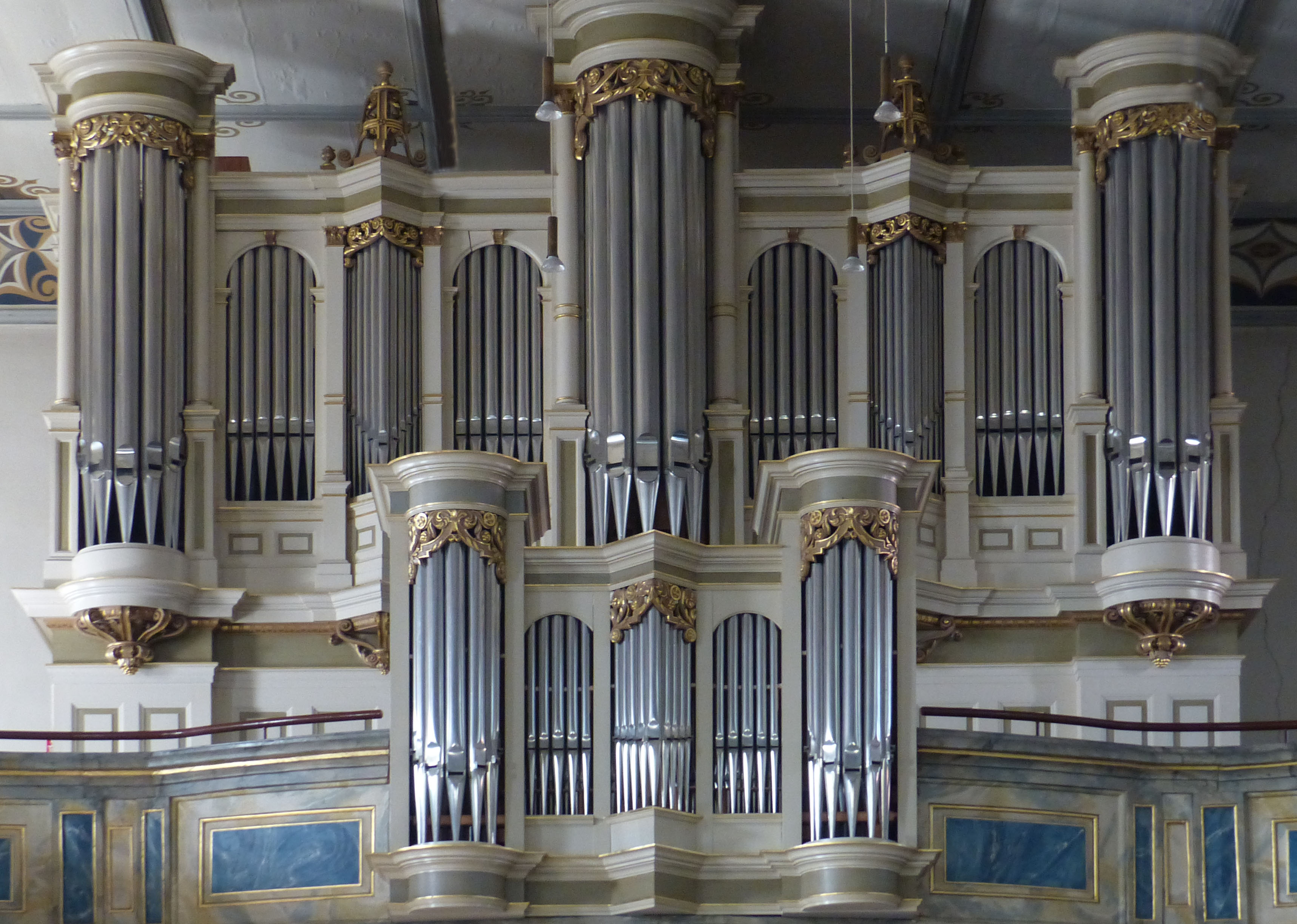 Erbaut 1981, mit Rückpositiv